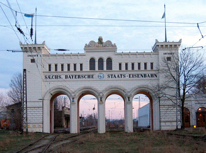 Beschreibung: Portikus des Leipziger Bayerischen Bahnhofs Quelle: eigenes Bild Fotograf: Benutzer:FloSch Lizenzstatus: GNU FDL